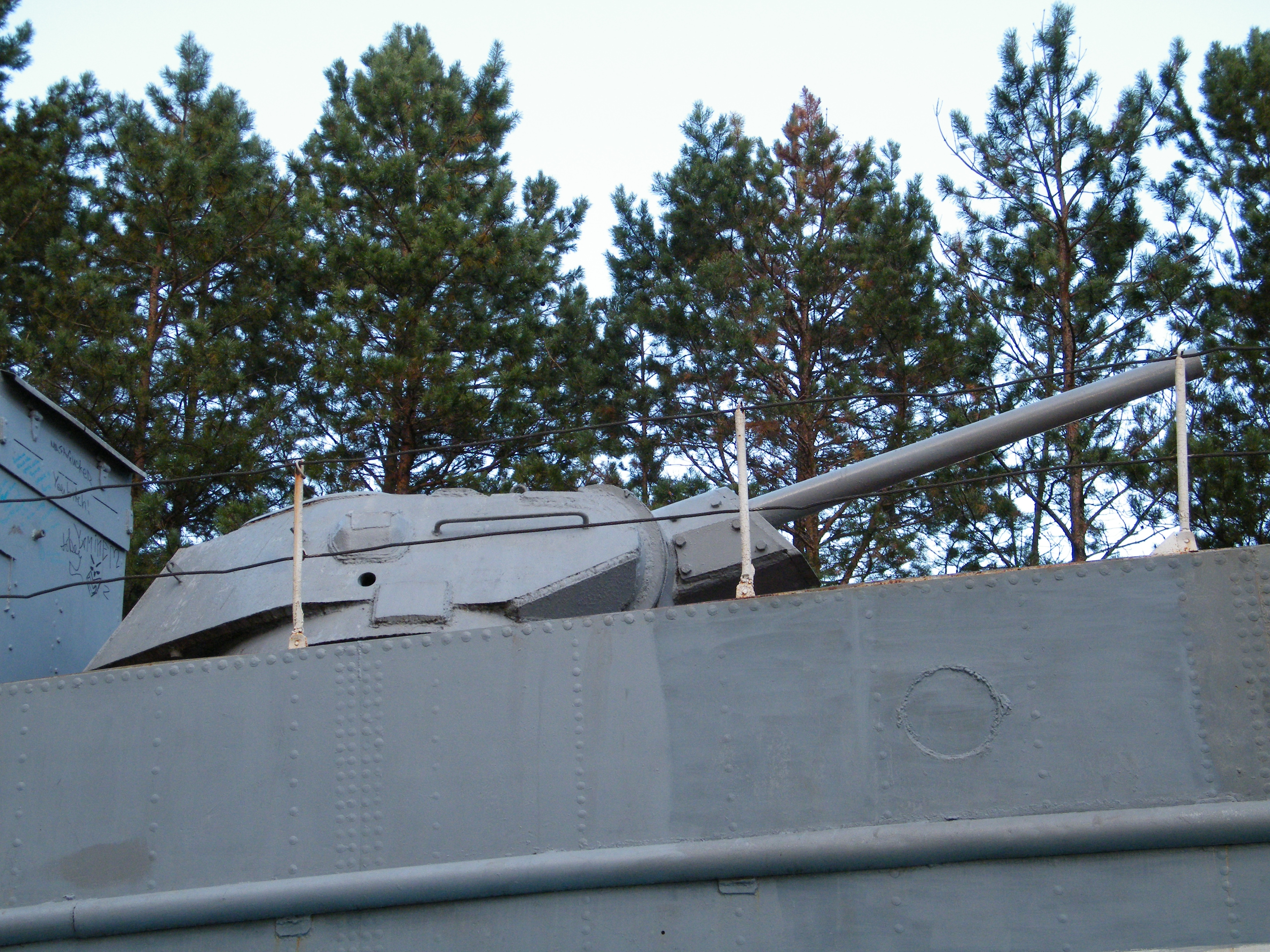 BK-302 armoured boat